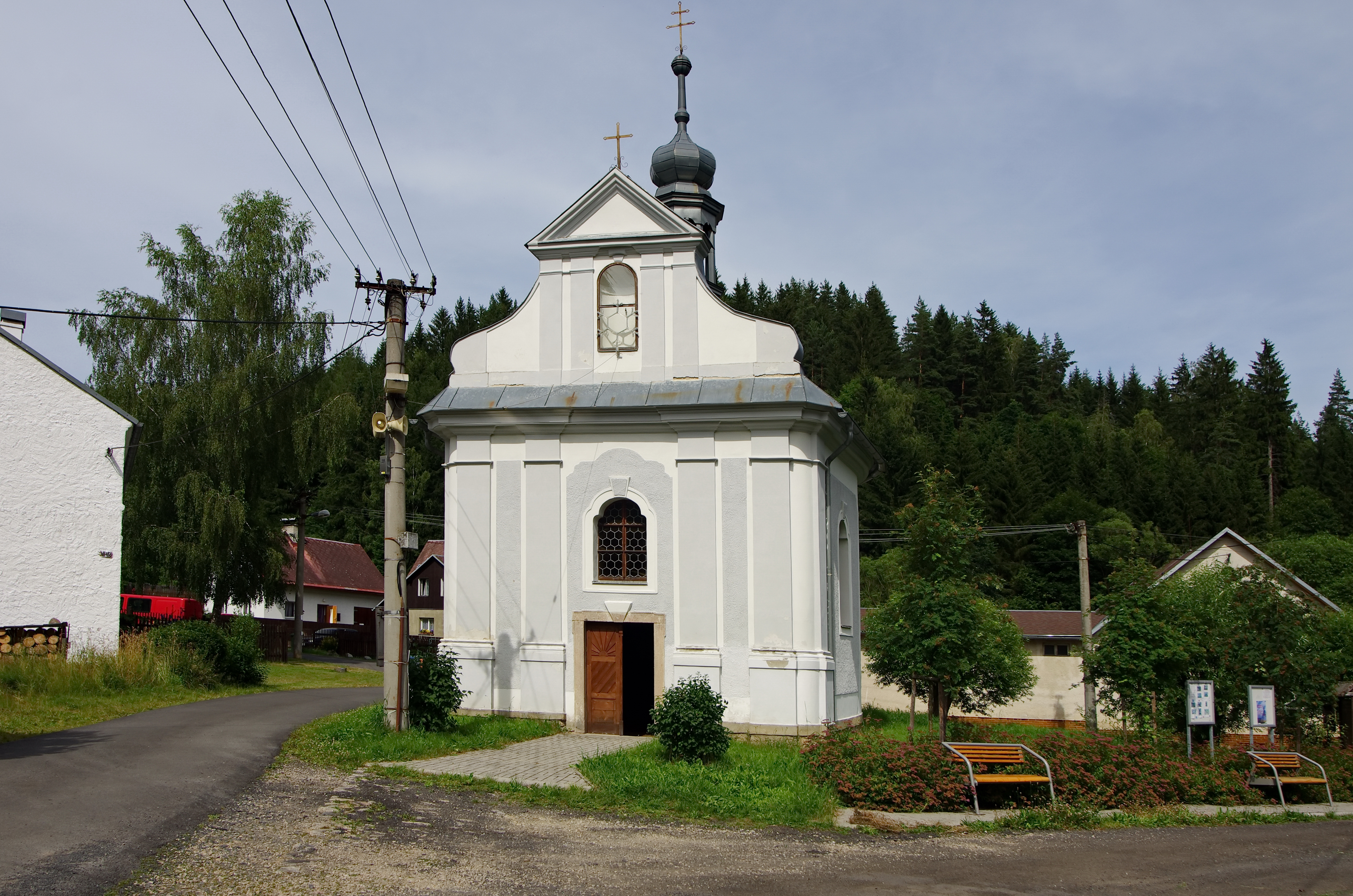 Dolní Hluboká, kaple sv. Prokopa, okres Sokolov